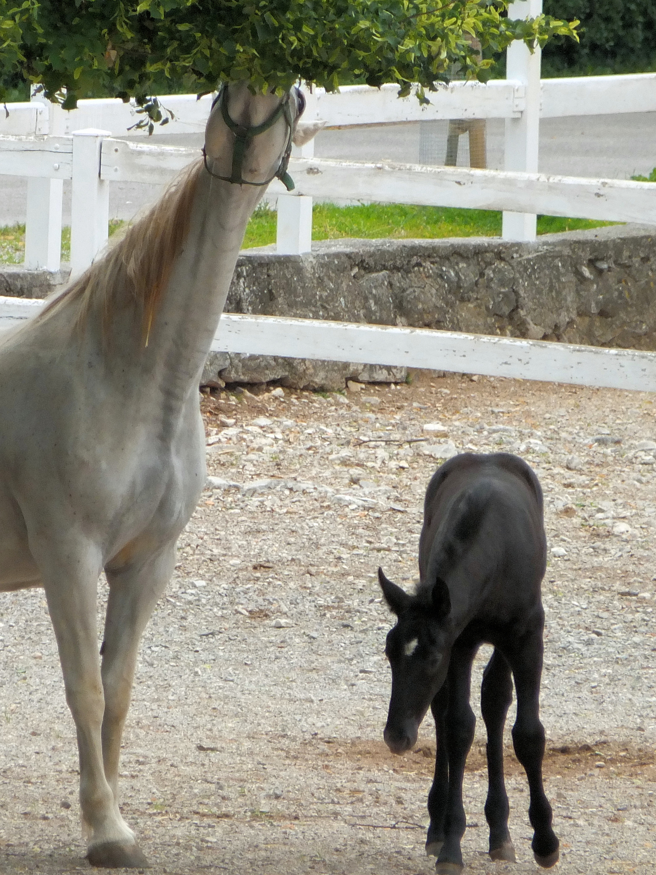 Lipica Stud Farm, Slovenia, June 2012